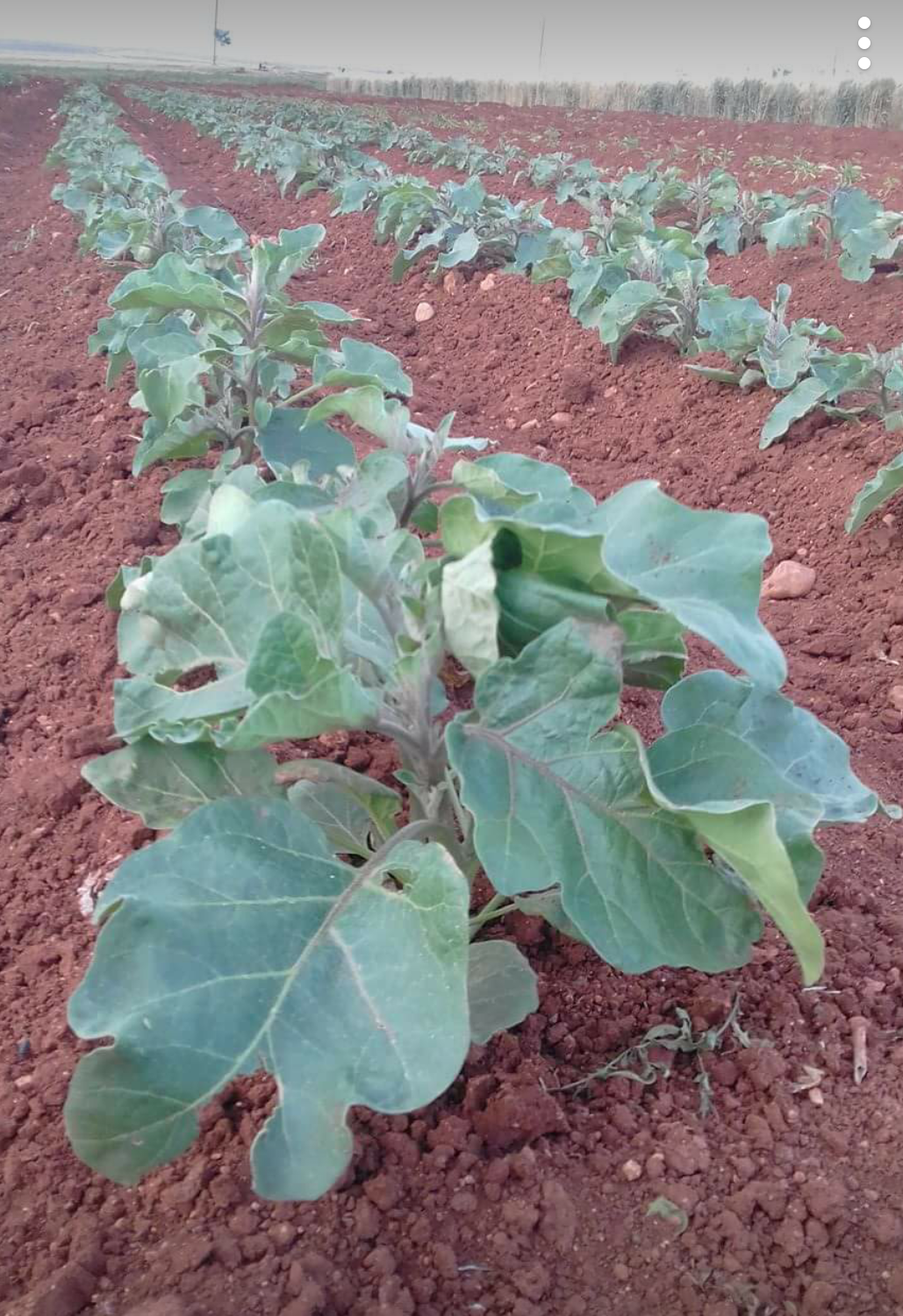 باذنجان ، Aubergine